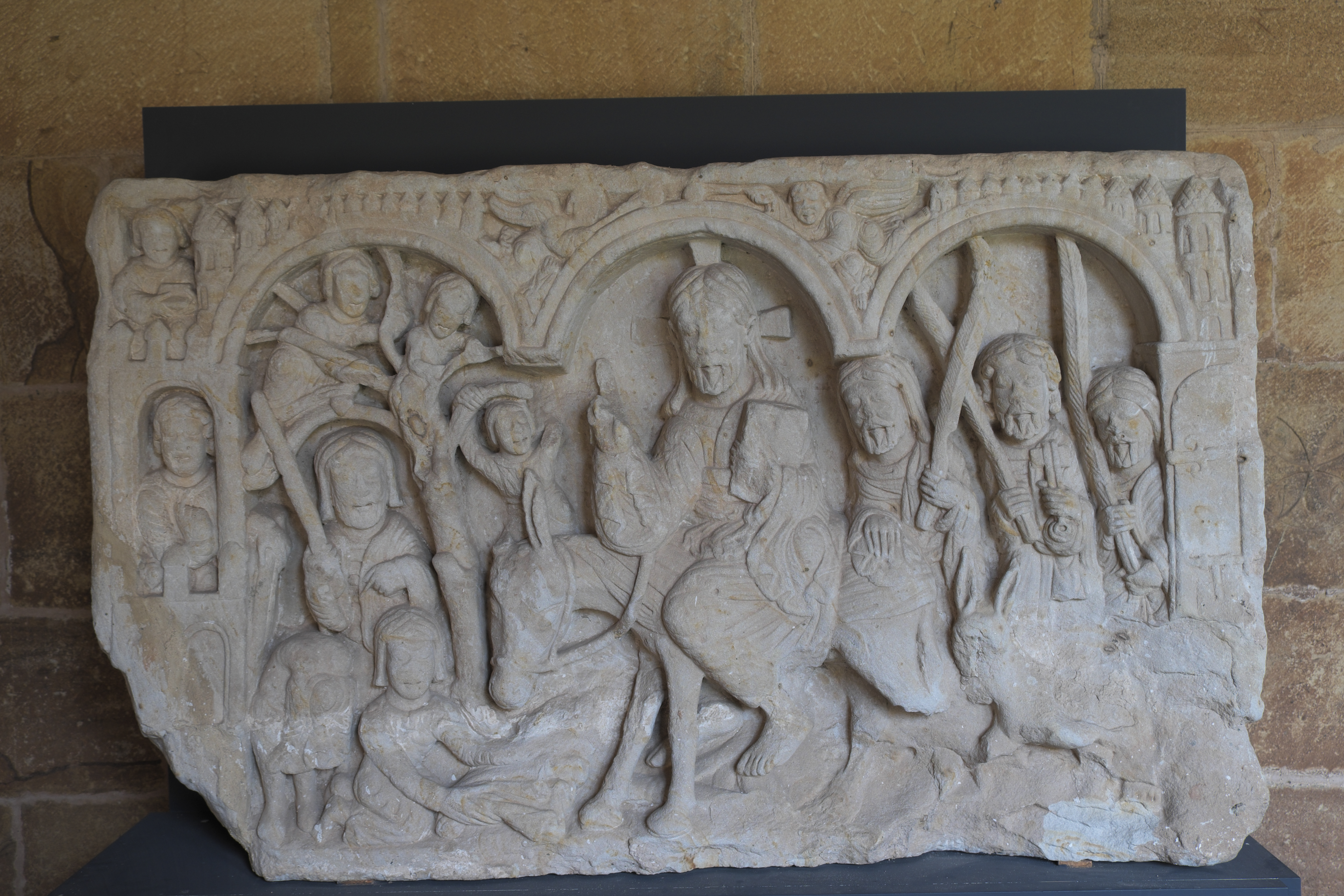 Kreuzgang der Konkathedrale San Pedro in Soria (Kastilien-León/Spanien), Relief, Darstellung: Einzug Jesu in Jerusalem